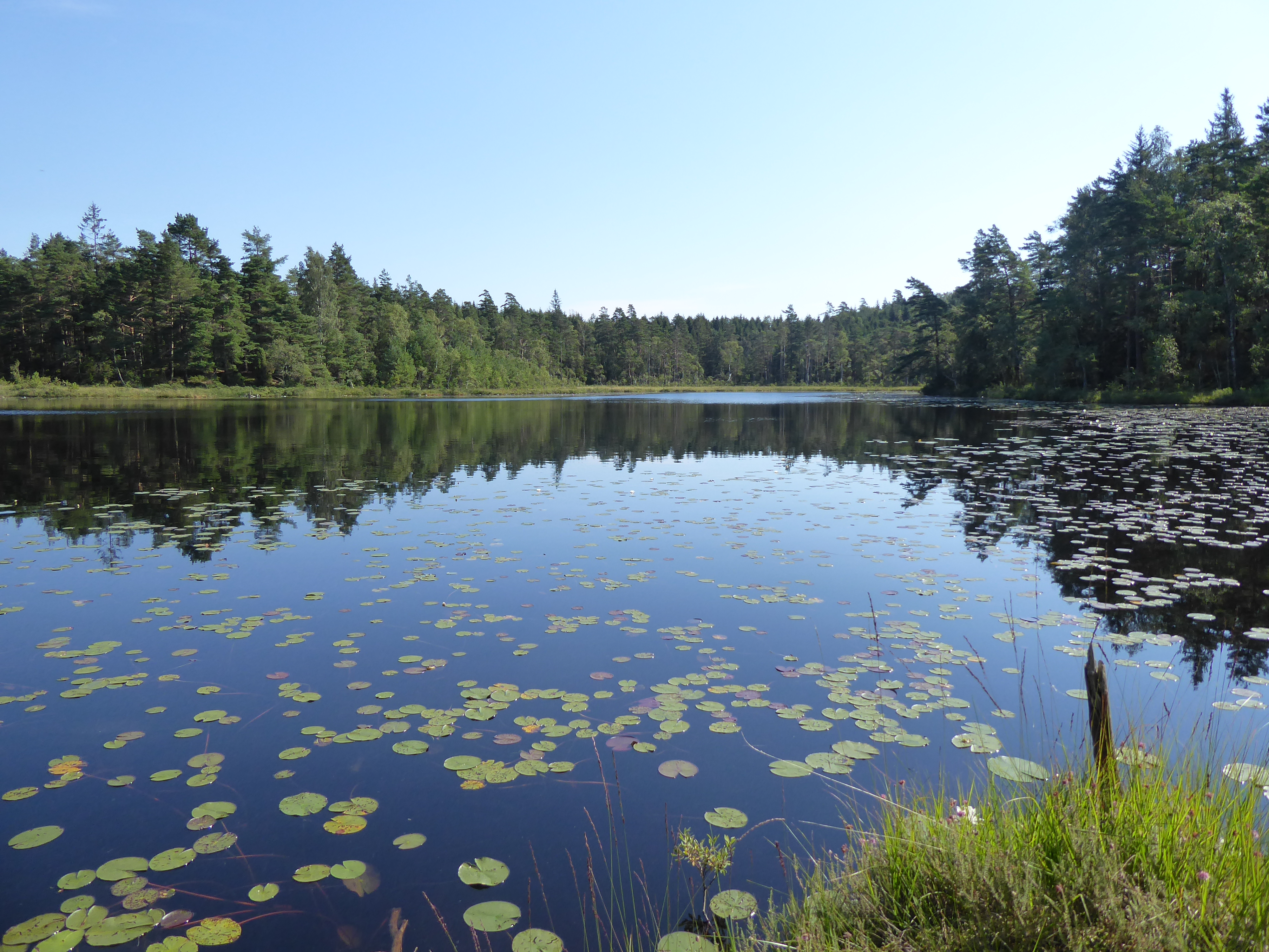 Stora Brastjärnen (Västergötland, Sverige) från SW den 7 augusti 2020.